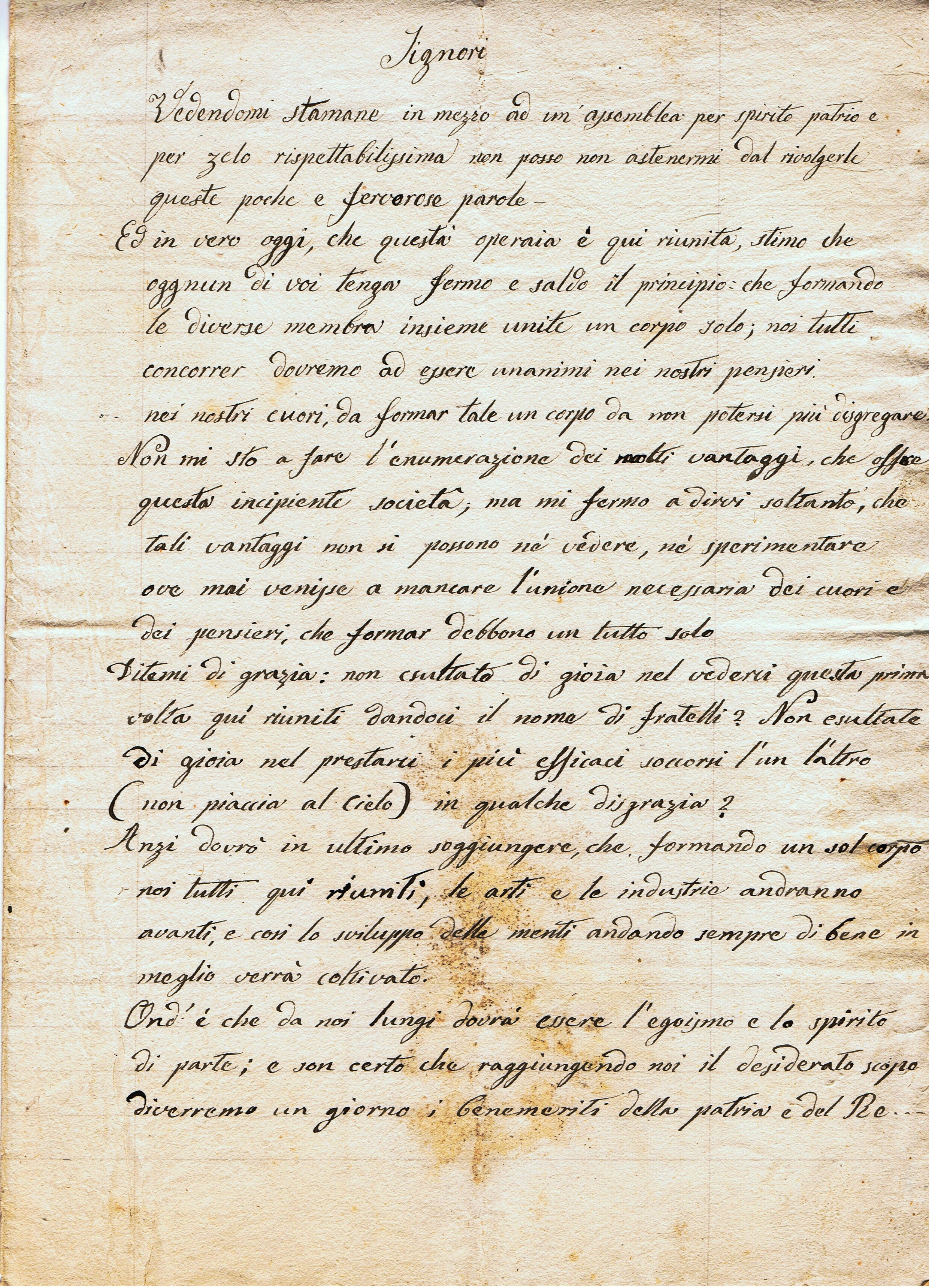 Discorso pronunciato all'assemblea di inaugurazione della Società Operaia di Cerreto Sannita dal presidente Giuseppe Ciarlelli (17 agosto 1881).